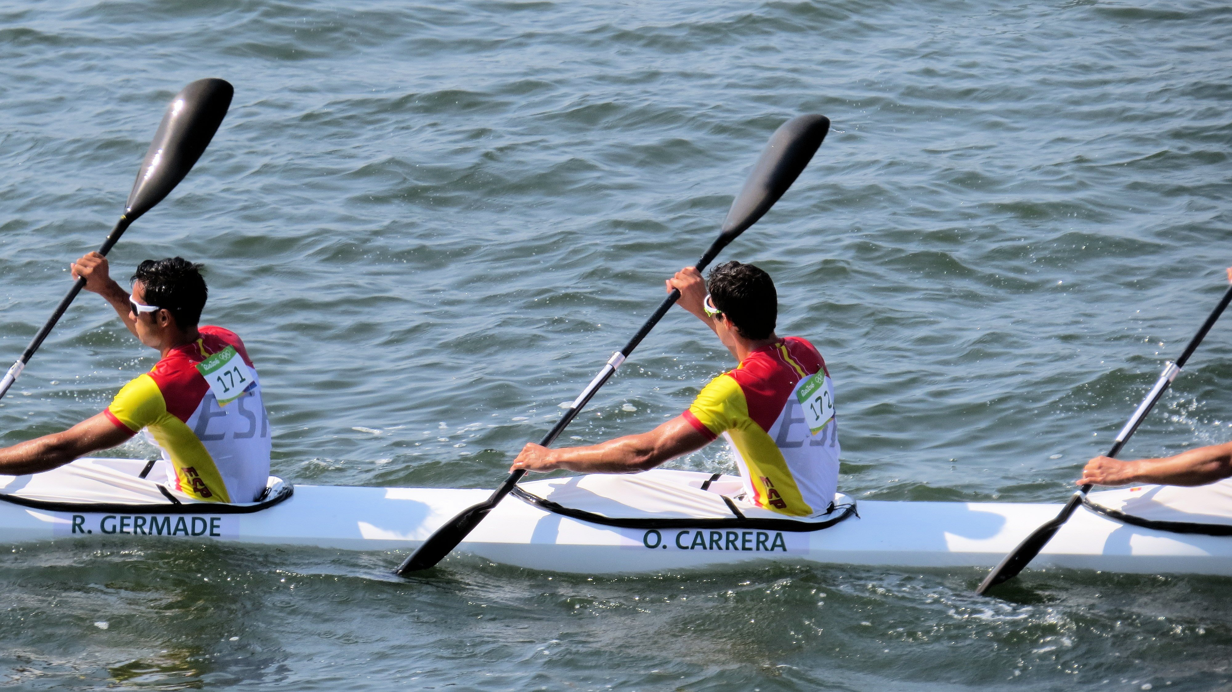 Sx50